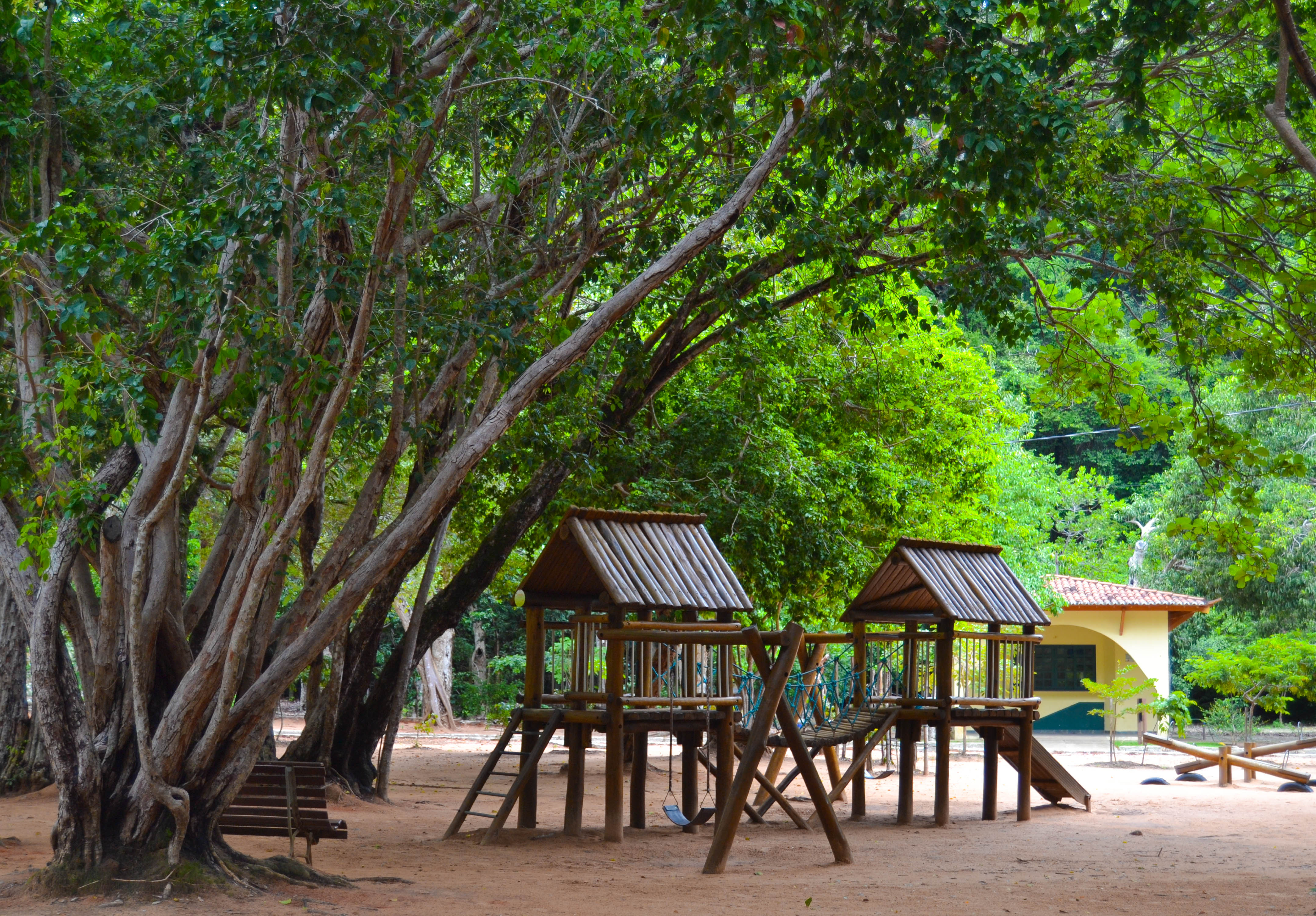 O Parque Estadual Dunas de Natal, mais conhecido simplesmente como Parque das Dunas ou Bosque dos Namorados, é uma reserva de 1.172 hectares de Mata Atlântica situada no coração da cidade de Natal, capital do estado brasileiro do Rio Grande do Norte. É administrado pelo Instituto de Desenvolvimento Econômico e Meio Ambiente (Idema). Criado através do Decreto Estadual nº 7.237 de 22 de novembro de 1977, o Parque das Dunas foi a primeira unidade de conservação ambiental implantada no estado do Rio Grande do Norte. É parte integrante da reserva da biosfera da Mata Atlântica reconhecida pela UNESCO e, por isso, declarada Patrimônio Ambiental da Humanidade. O parque distribui-se por vários bairros da zona sul e leste da cidade, se estendendo ao longo da Via Costeira, onde abriga também o Centro de Convenções de Natal.